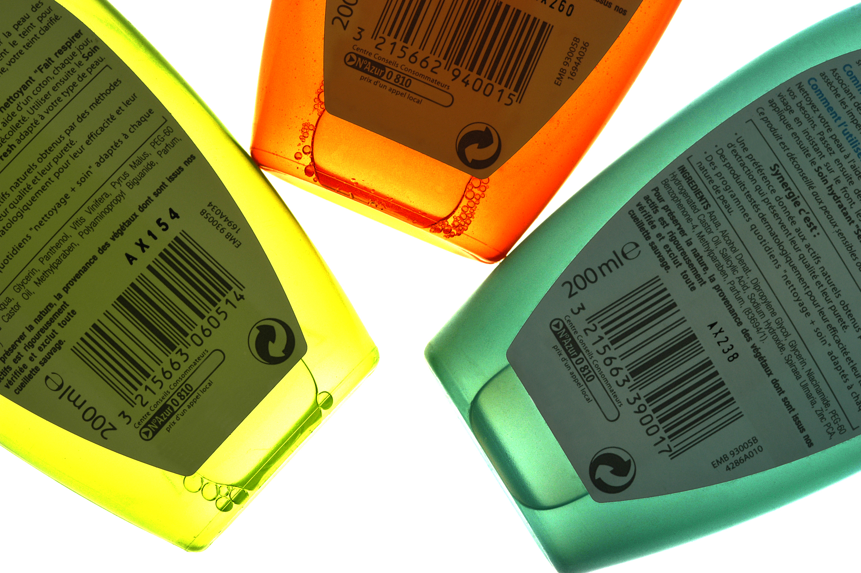 Foto de produtos com o código de barras, gerenciado pela GS1 Brasil